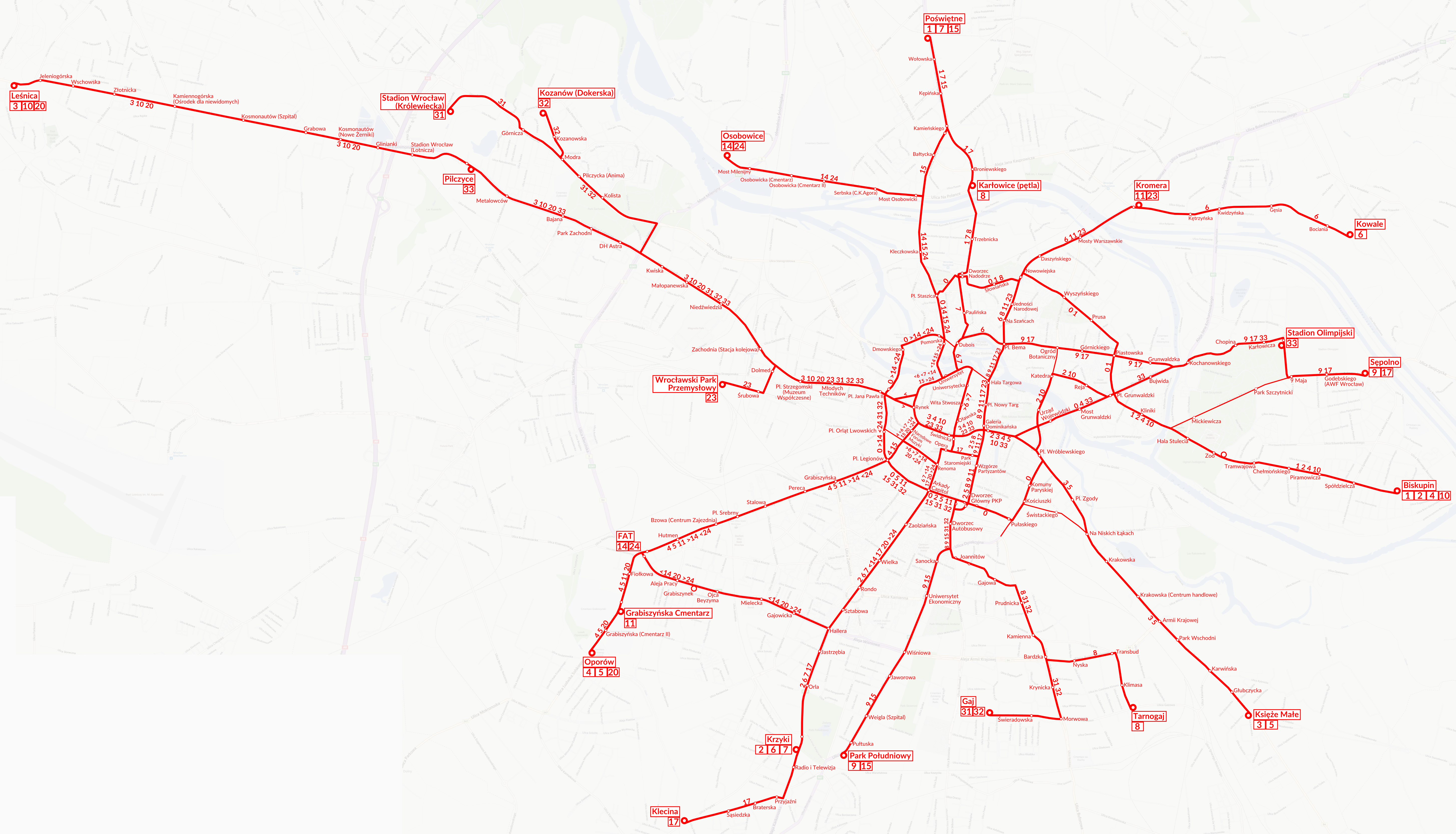 Schemat sieci tramwajowej we Wrocławiu